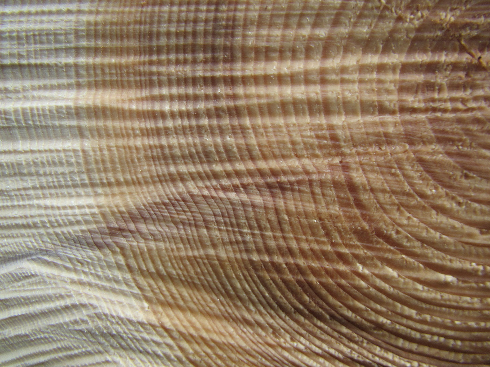 Growth rings in Abies alba